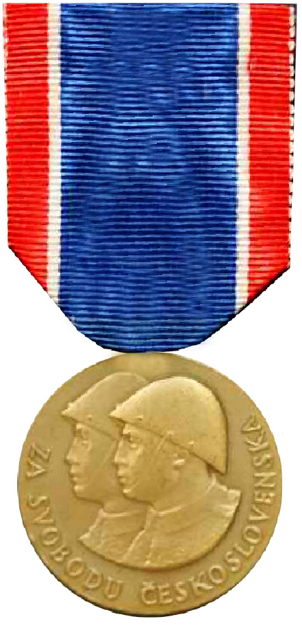 Medaila Československého vojenského radu Za slobodu bola zriadená vládnym nariadením č. 105/1946 Sb. dňa 2. apríla 1946